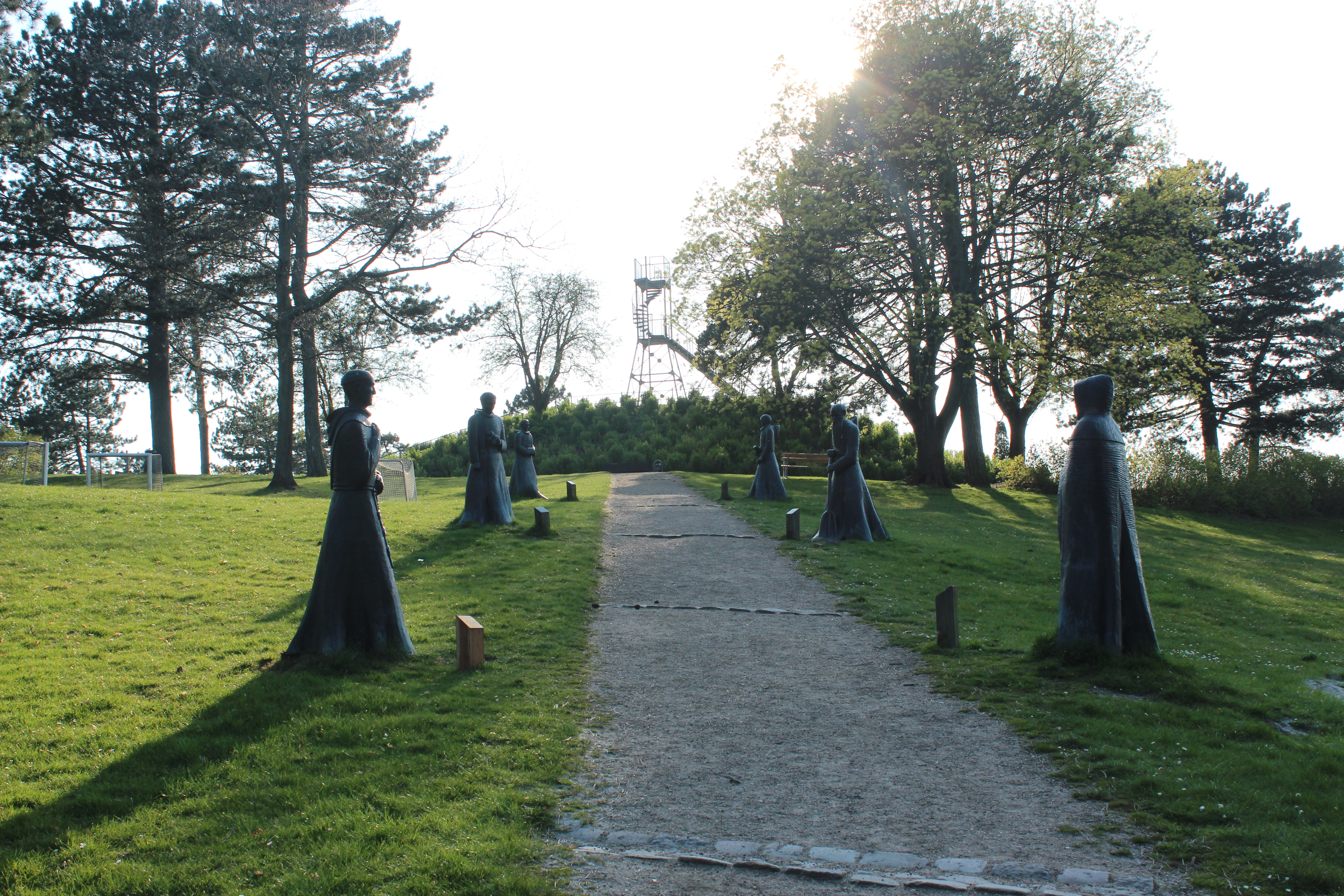 Munkestatuer på Munkebakken. Kig op mod udsigtstårnet på toppen.